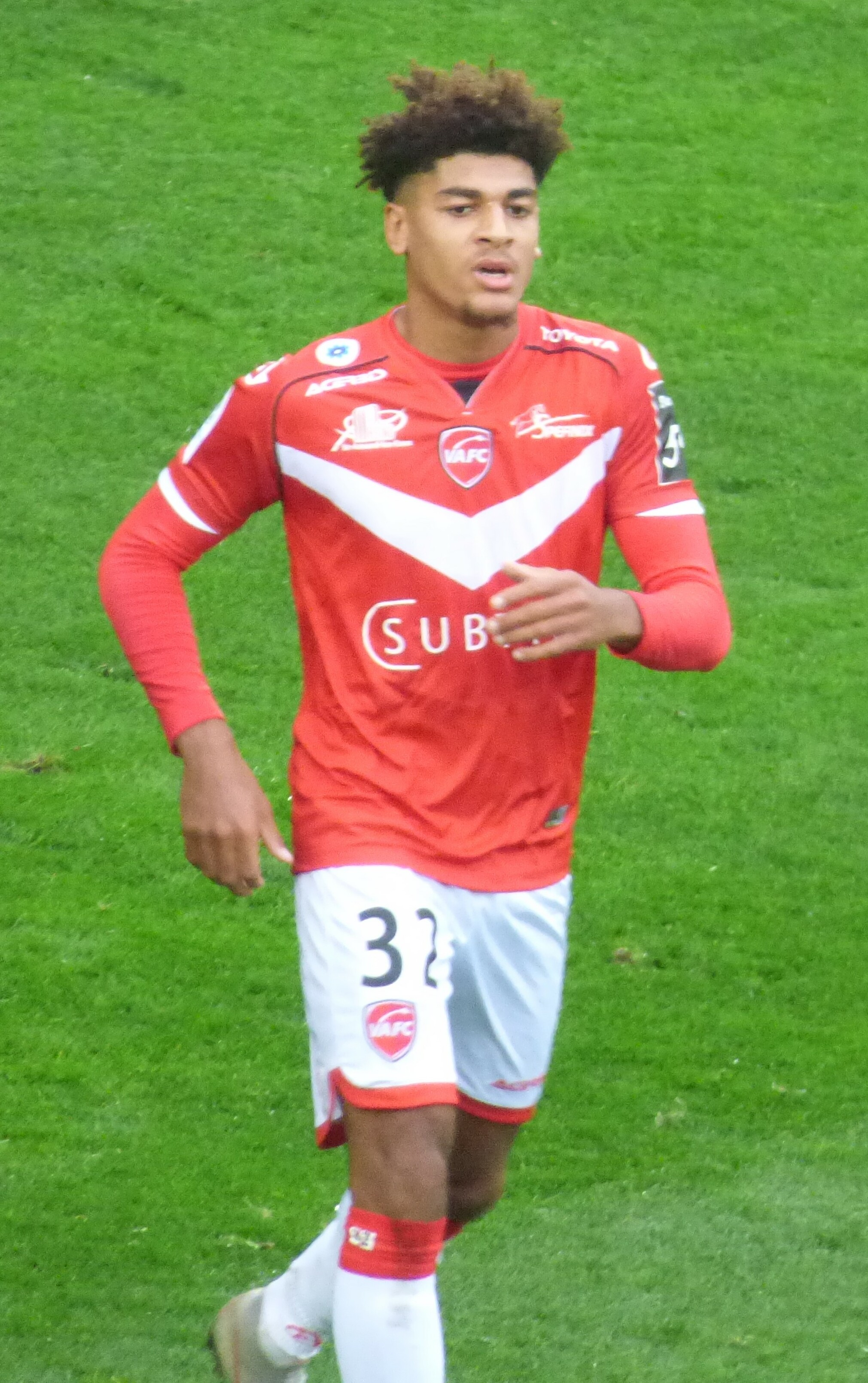 Anthony Goelzer lors du match Valenciennes FC / RC Lens, comptant pour la quatorzième journée du championnat de France de Ligue 2 2018-2019, le 10 novembre 2018, au Stade du Hainaut.